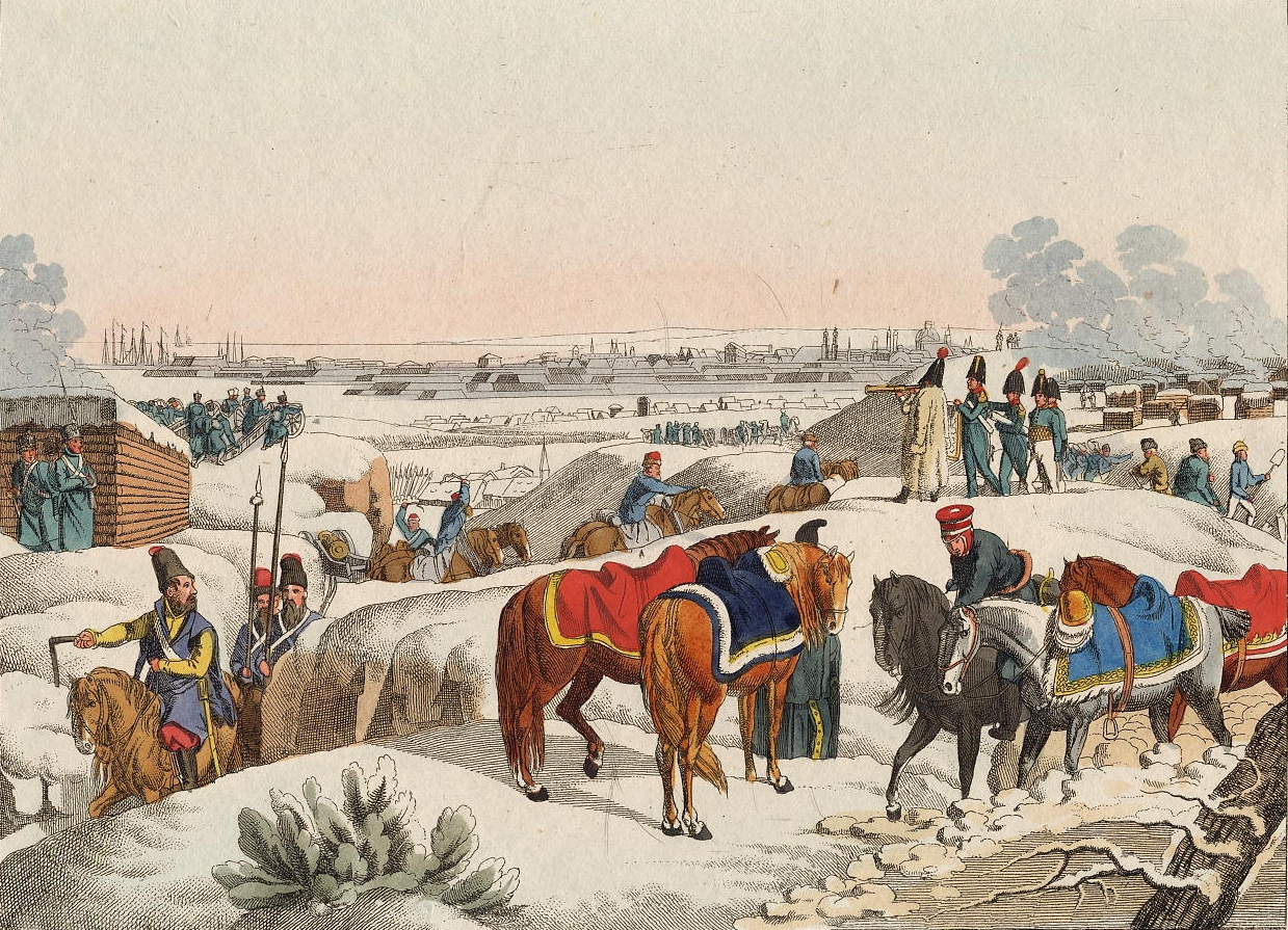 De Russische stellingen bij de belegering van Danzig in de winter van 1813.